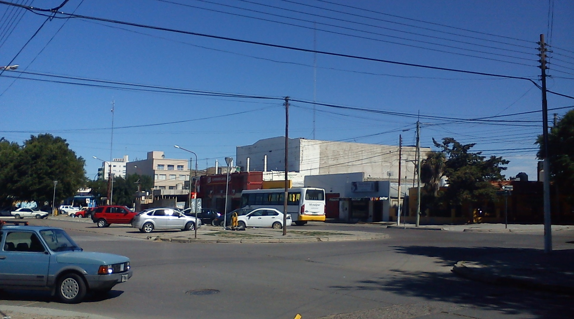 Foto mía, C2 sobre el centro